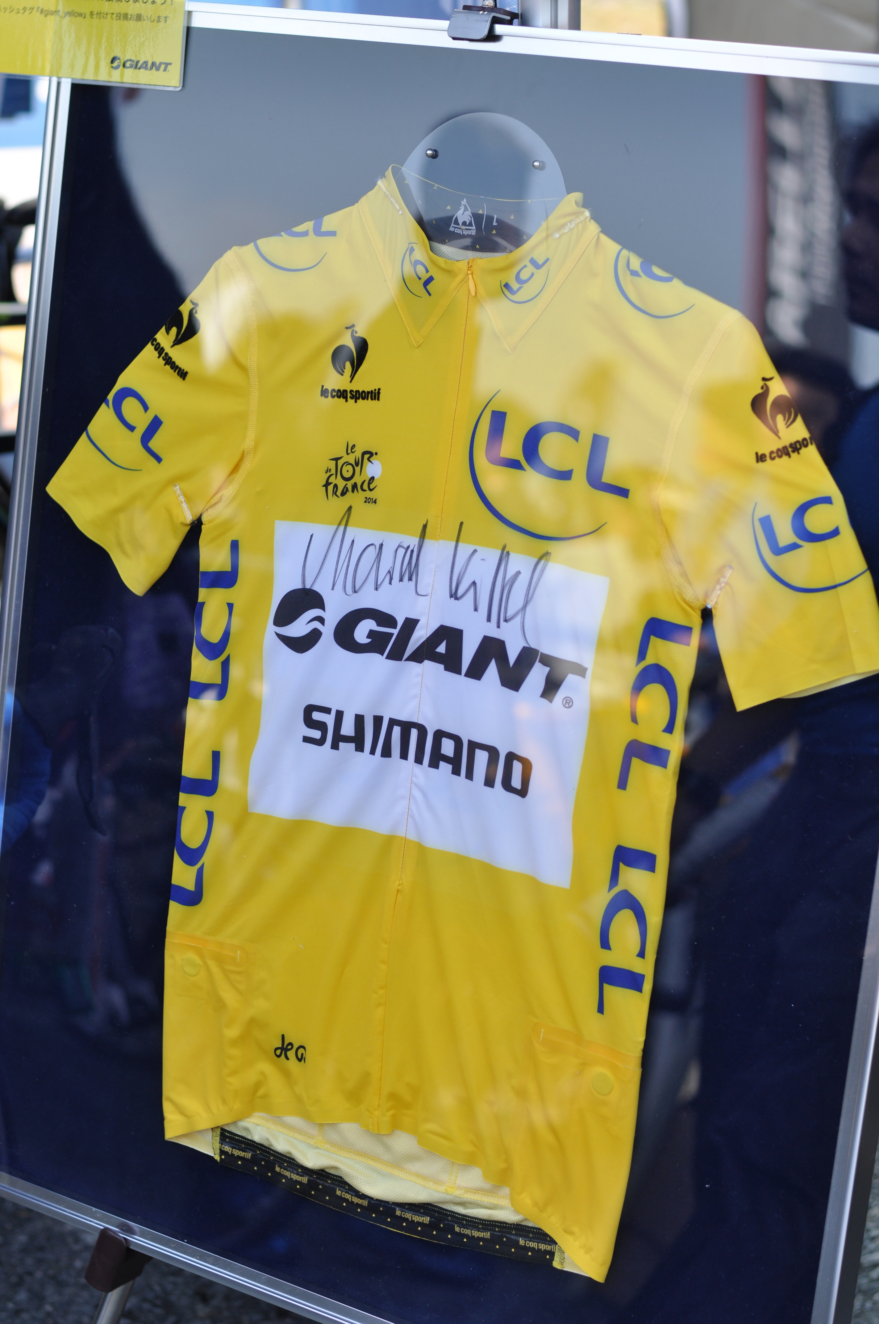 マルセル・キッテルがツールドフランス2014で獲得したサイン入りマイヨジョーヌ